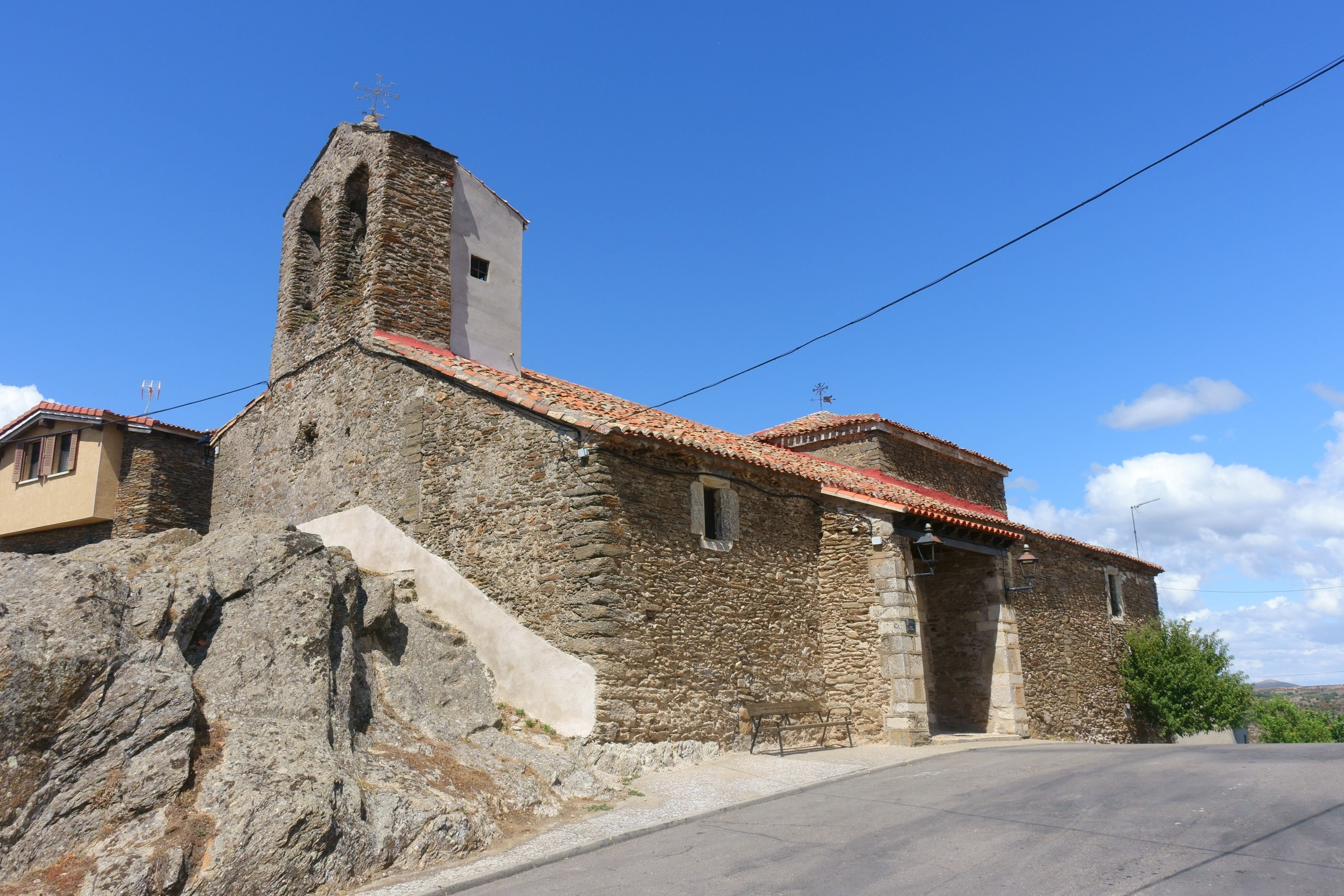 Iglesia de San Clemente, Zarzuela de Jadraque (Guadalajara, España).